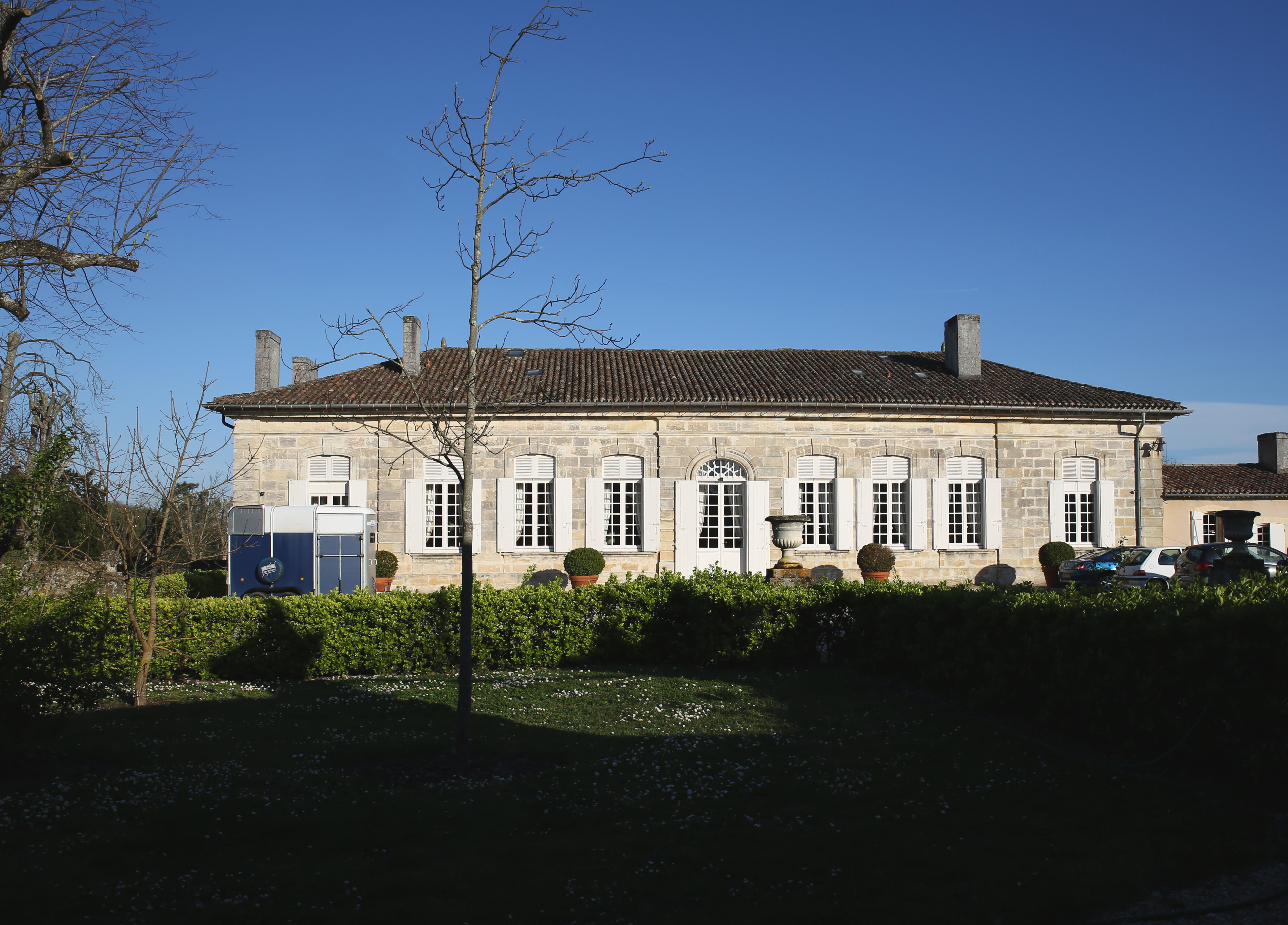 Château de Bacalan